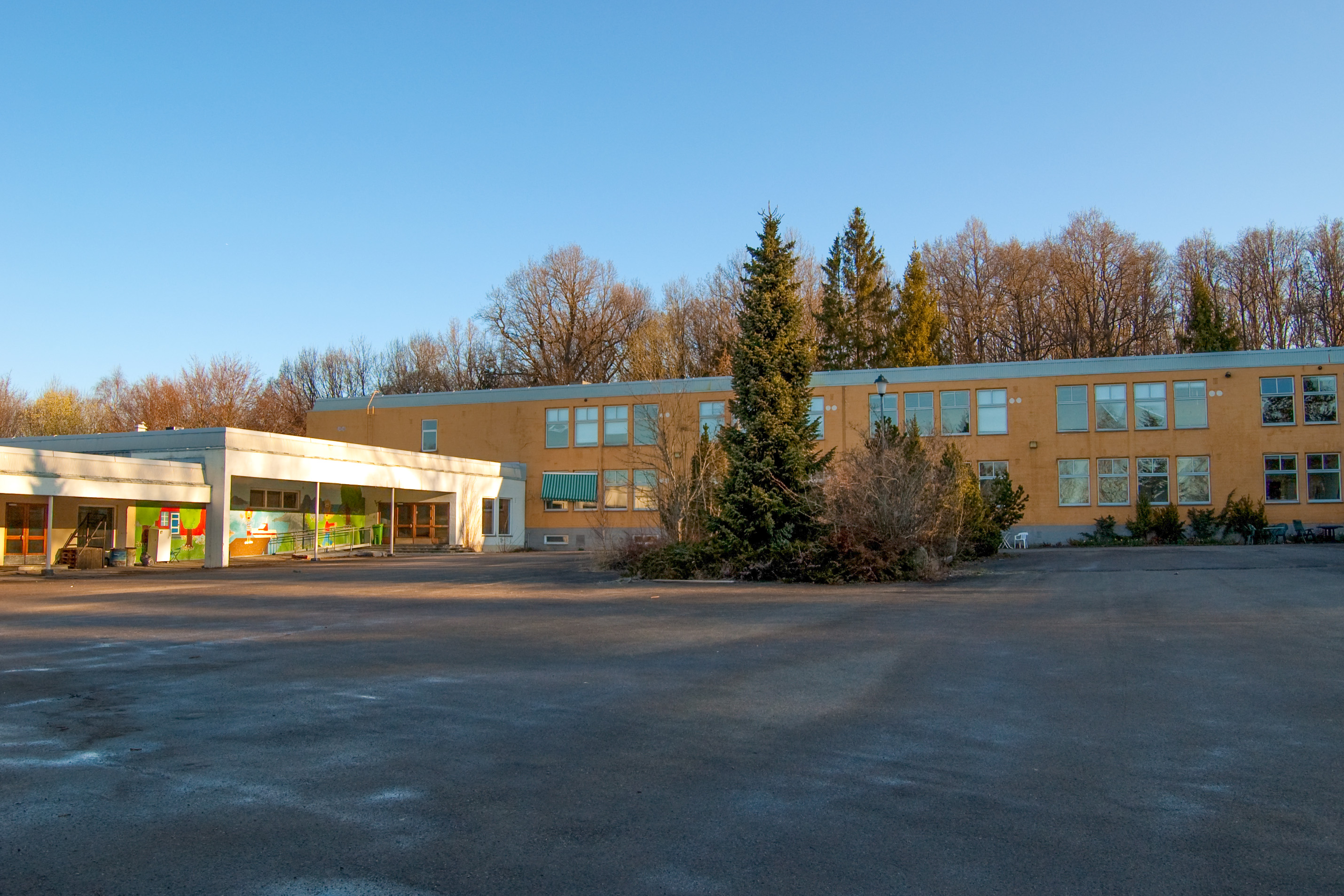 Kjelle Ungdomsskole (nedlagt) i Tønsberg kommune, Vestfold